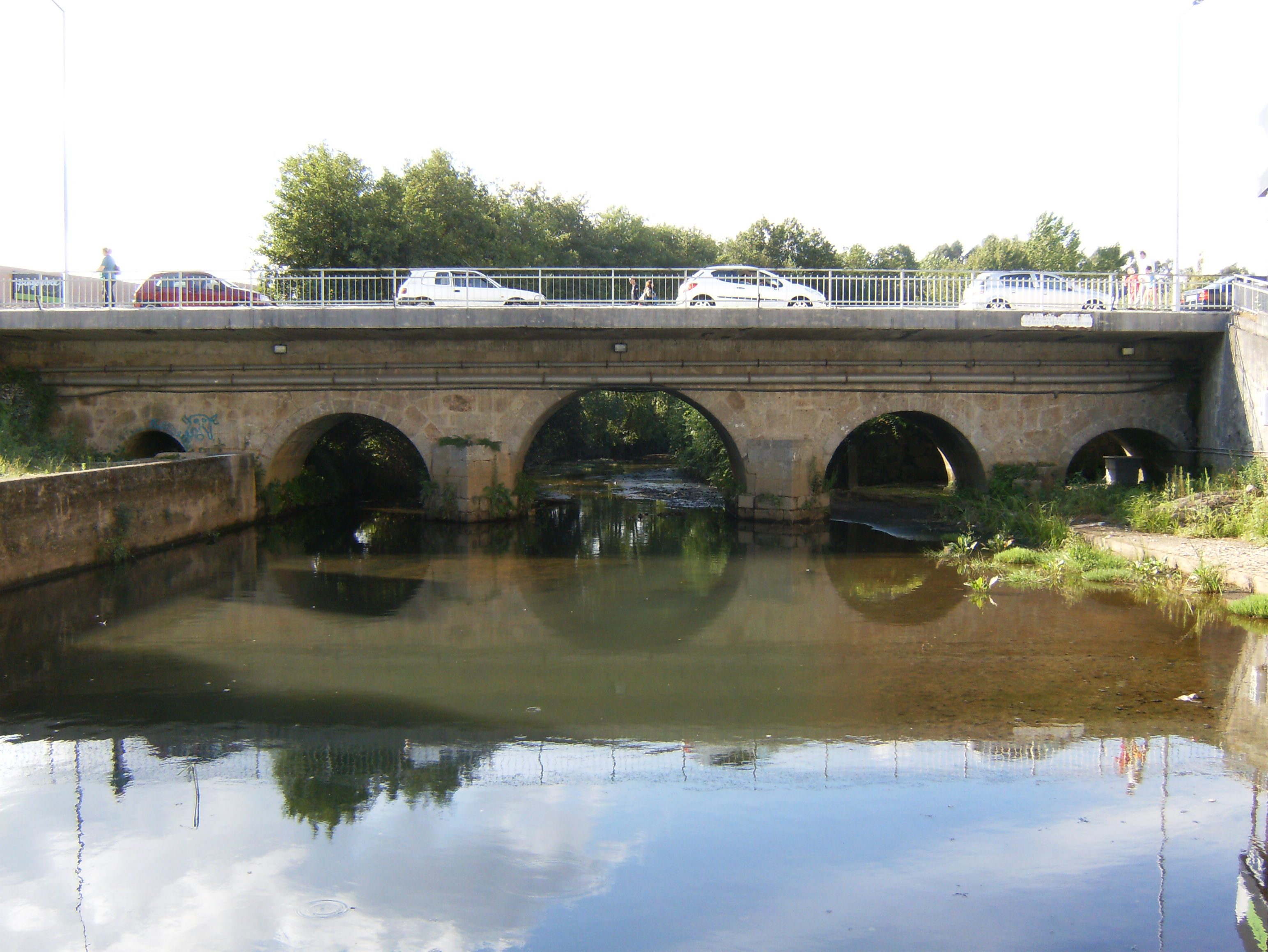 Ponte Nova (sobre o rio Carvalhosa) a principal entrada da cidade de Paços de Ferreira